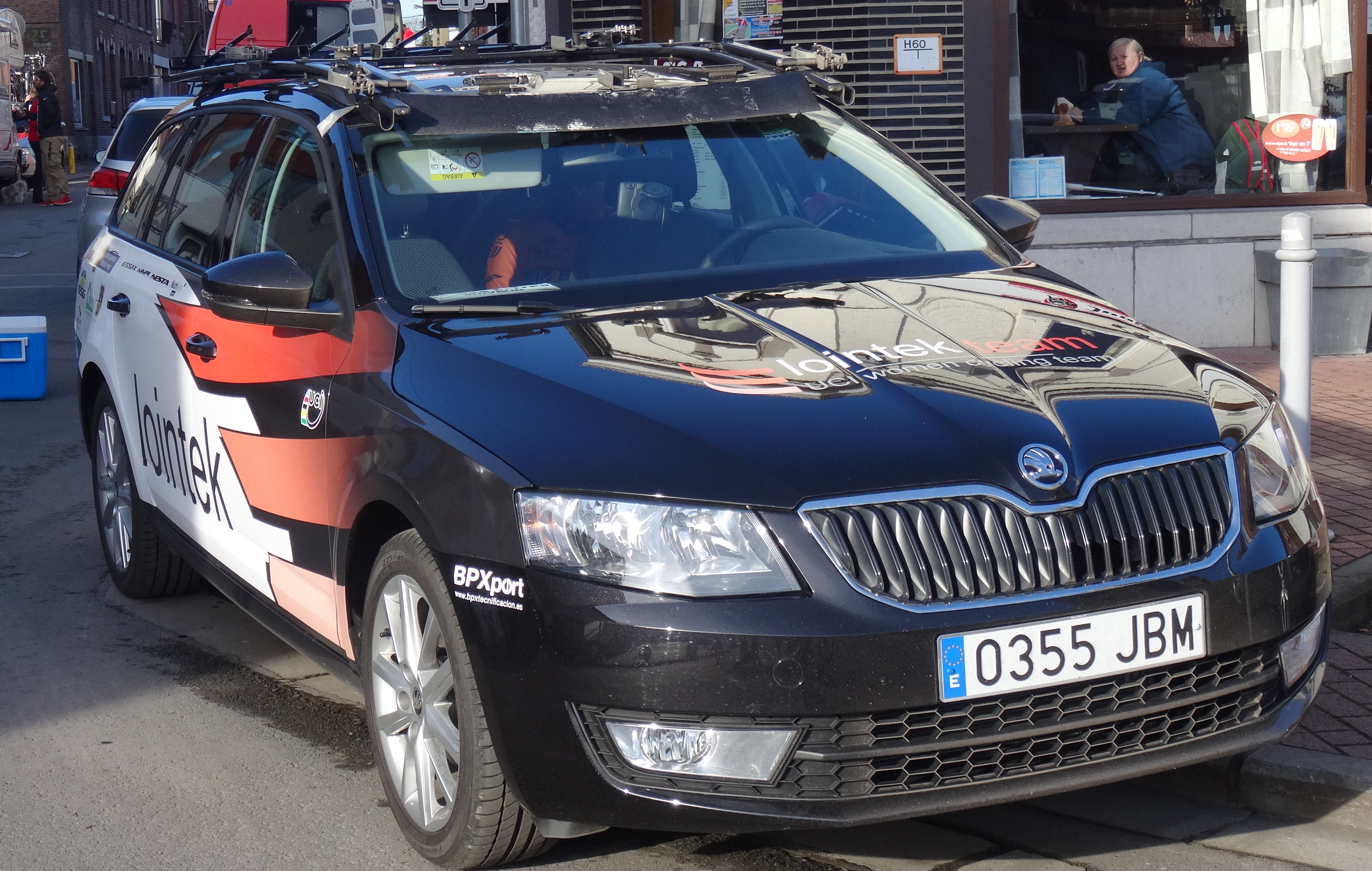 Reportage réalisé le mercredi 4 mars à l'occasion du départ du Samyn des Dames 2015 et du Samyn 2015 à Quaregnon, Belgique.